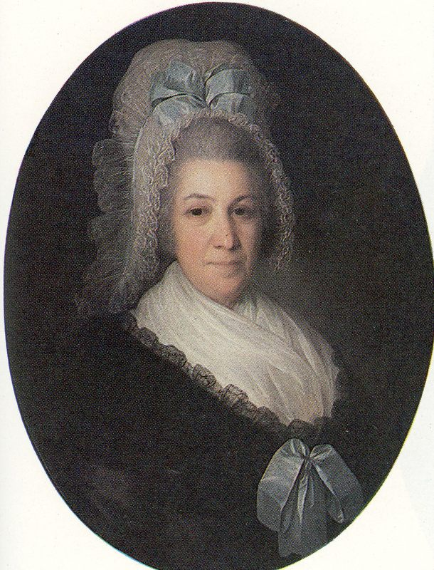 Возможно, княгиня Анна Ивановна Горчакова (1739-?), ур. Пещурова, бабка канцлера А.М. Горчакова.